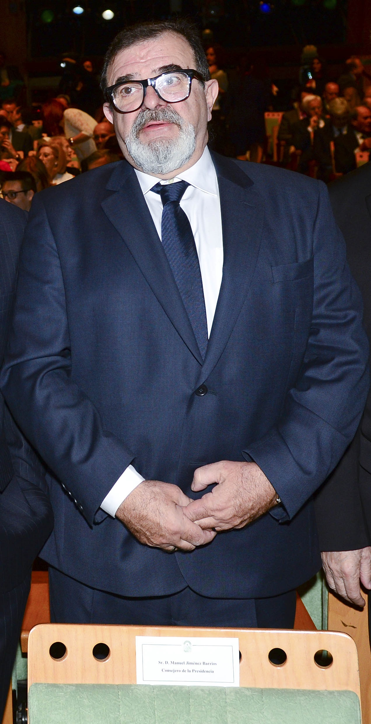 El Presidente de la Junta de Andalucía Rodríguez de la Borbolla